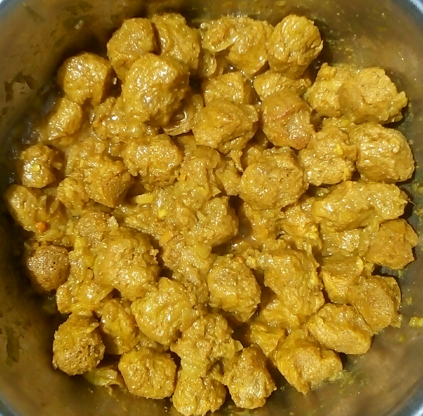 রান্নাকৃত সয়াবিন (সয়া চাংক)